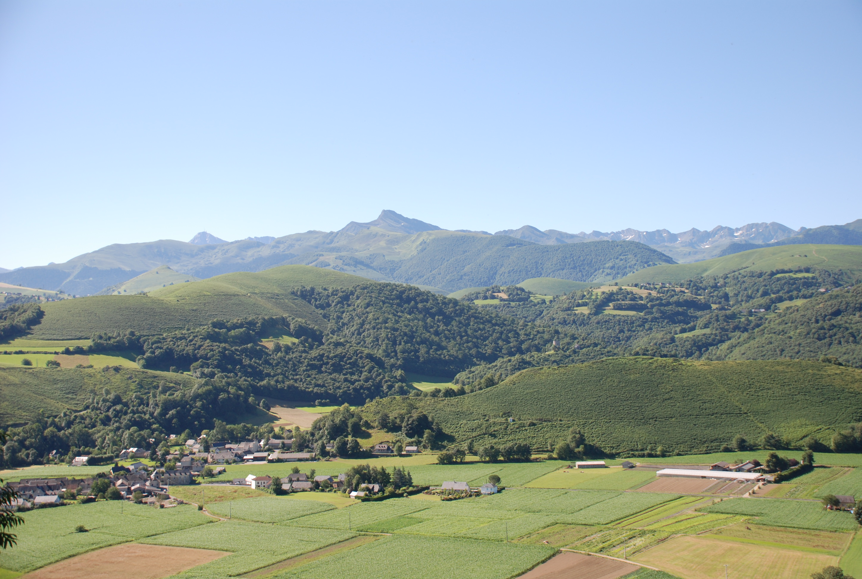 Vue de la chaîne (Montaigu, Pic du Midi), d'Arcizac ez Angles, du donjon des Angles etc., depuis Récahorts (Commune de Bourréac 65100)